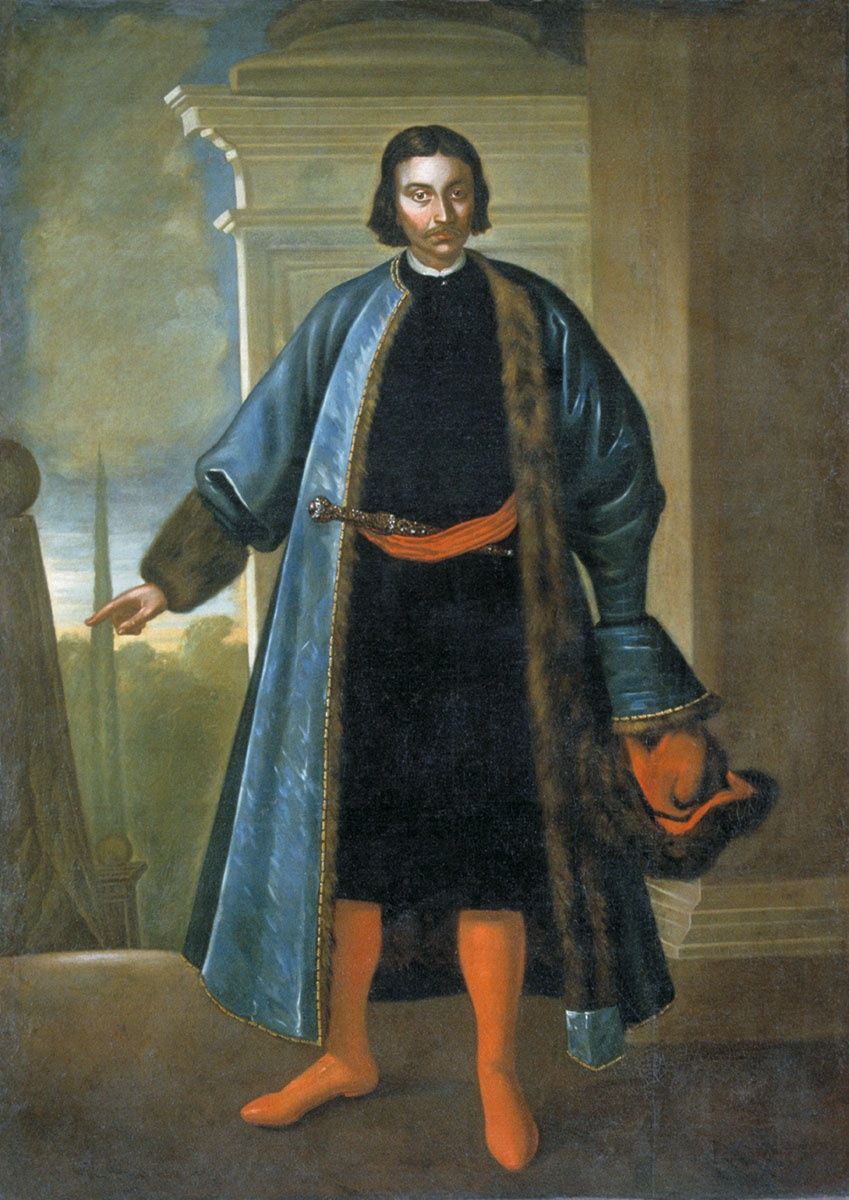 Портрет князя Репнина. Парсуна